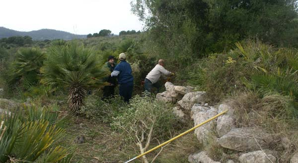 Es claper des Gegant